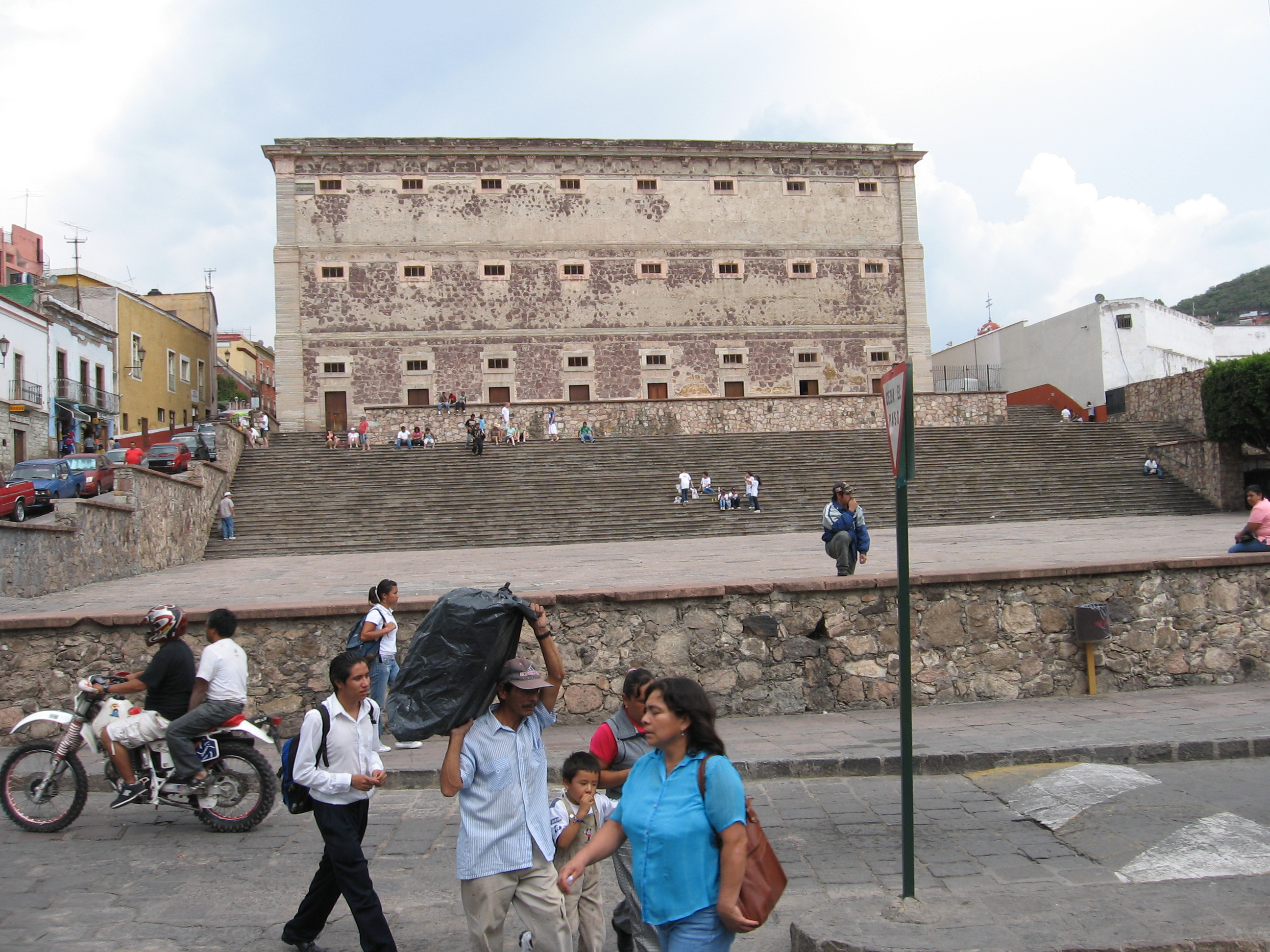 Alhondiga de Granaditas Guanajuato